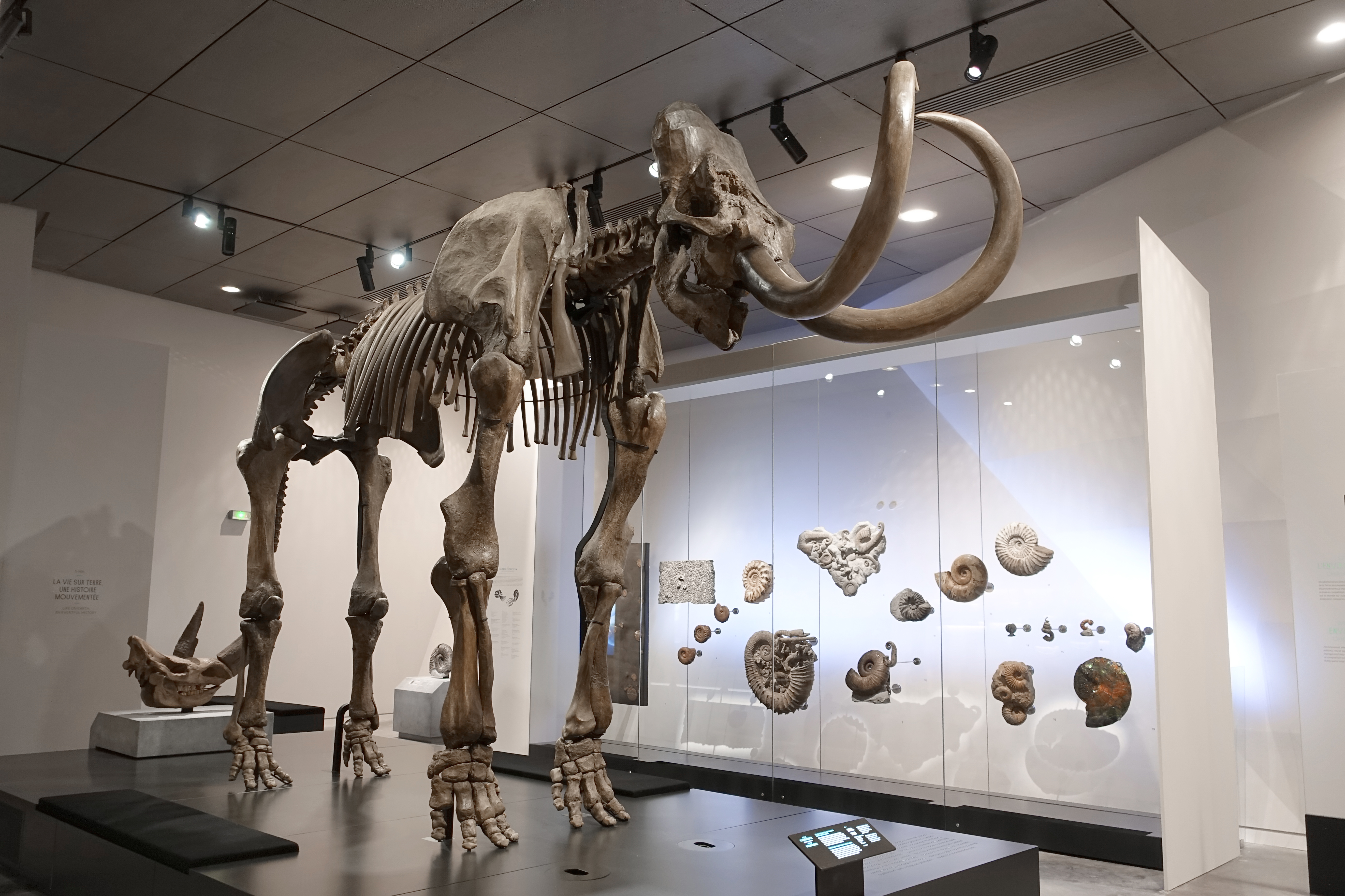 le mammouth de Choulans au Musée des Confluences de Lyon le 20 12 2014